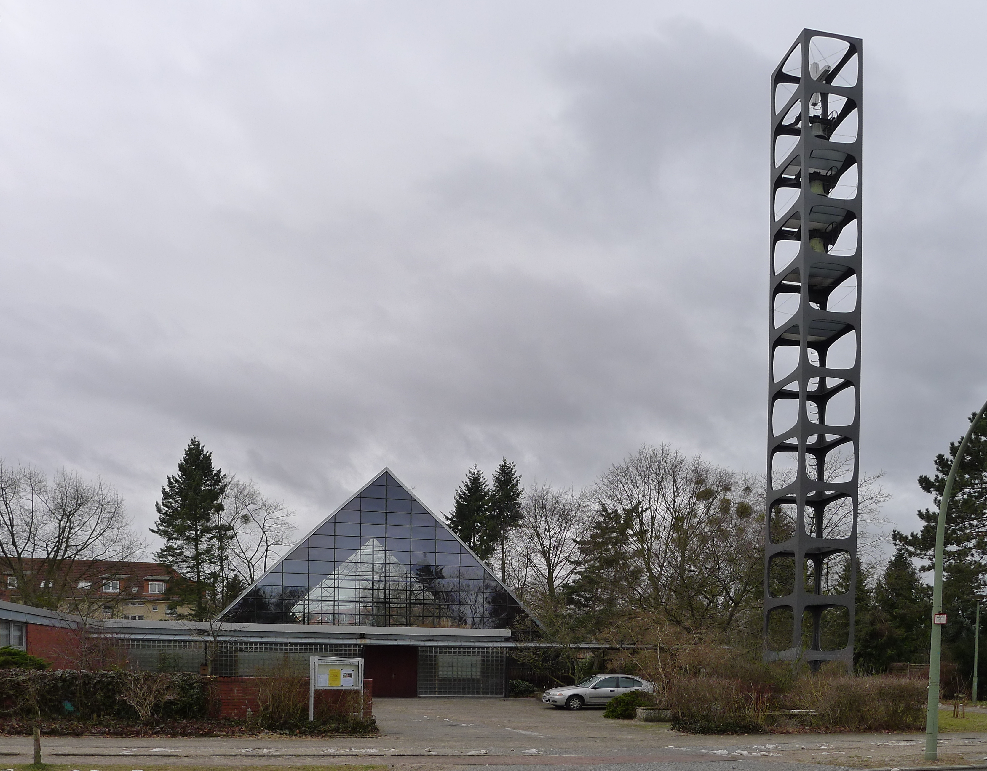 Blick auf die Gemenderäume (Links), die Kirche (Mitte) und den Campanile (Rechts)